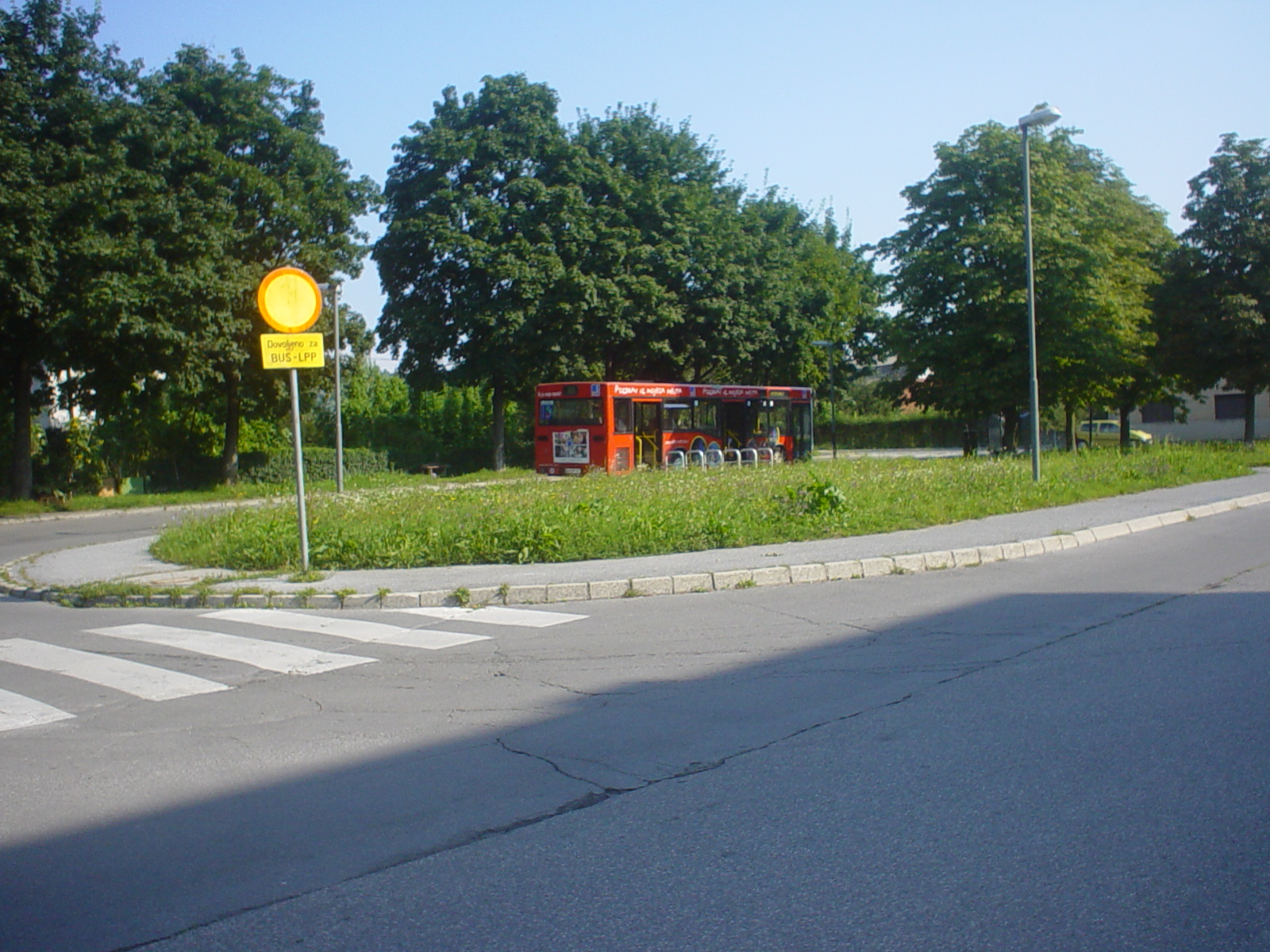 Obračališče v Kamni gorici (Ljubljana).